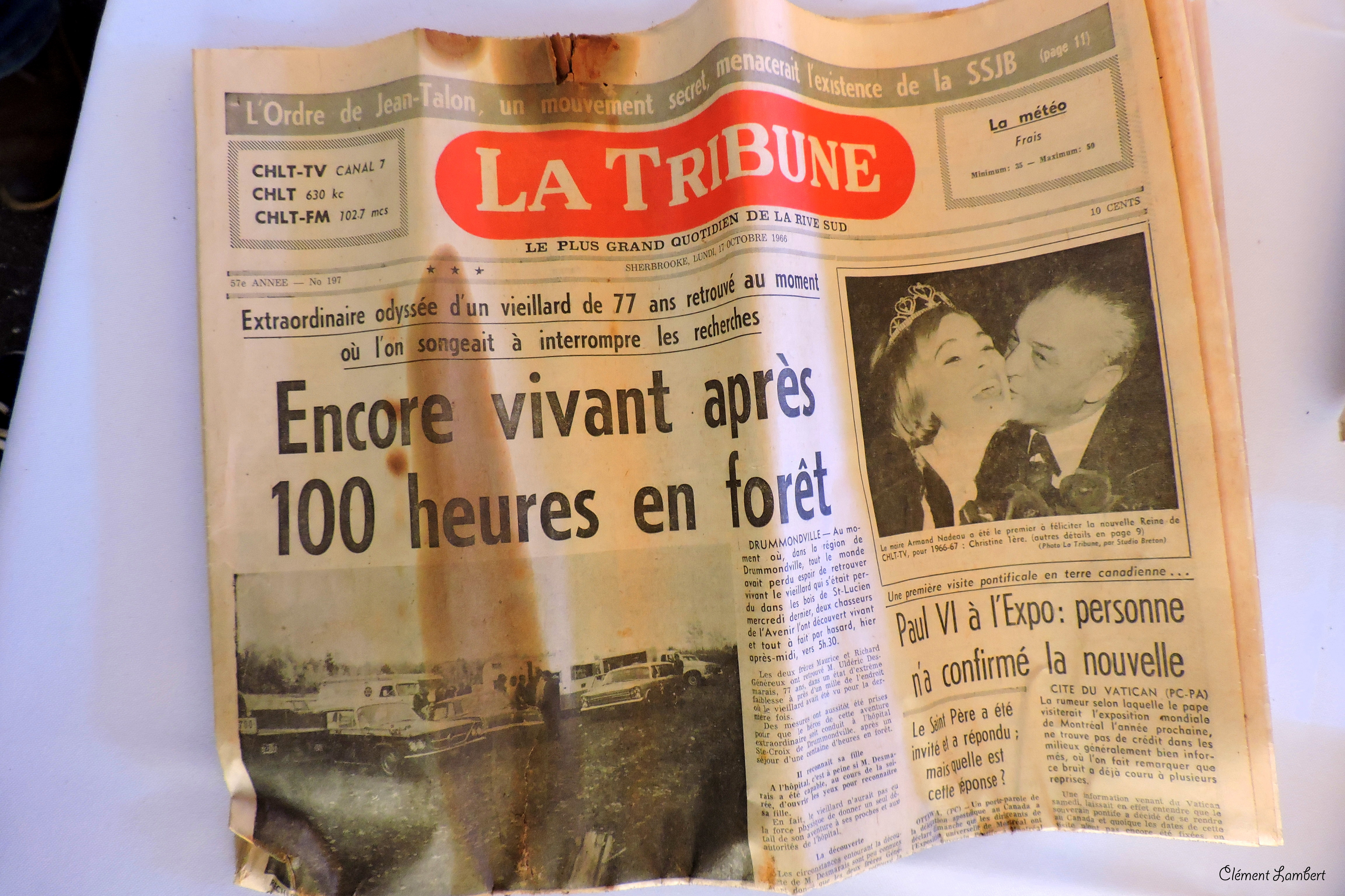 Ouverture de la Capsule temporelle du 150e! prise au parc Pinard de Drummondville, Journal La Tribune de 1966